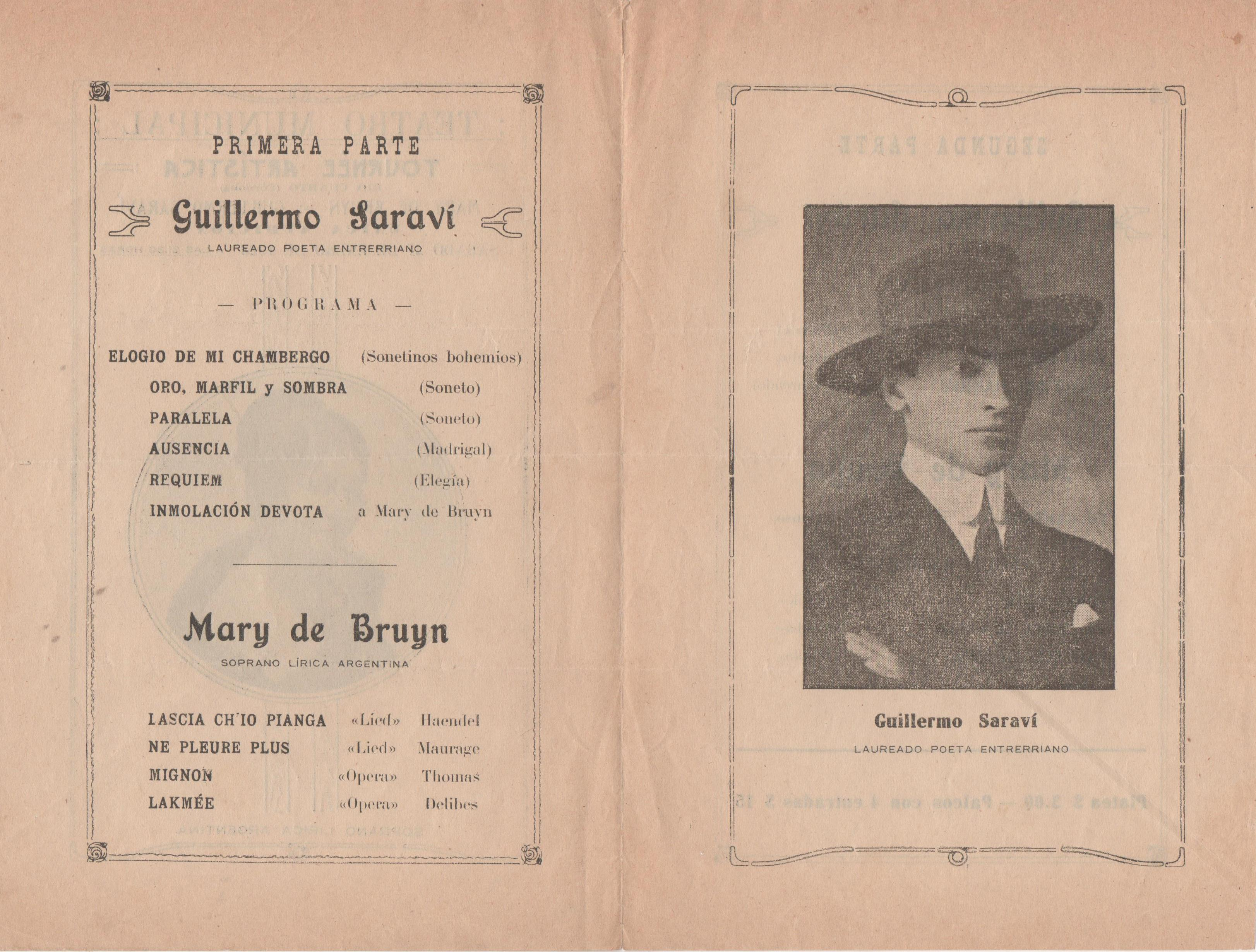 Captura de programa de Recital poético